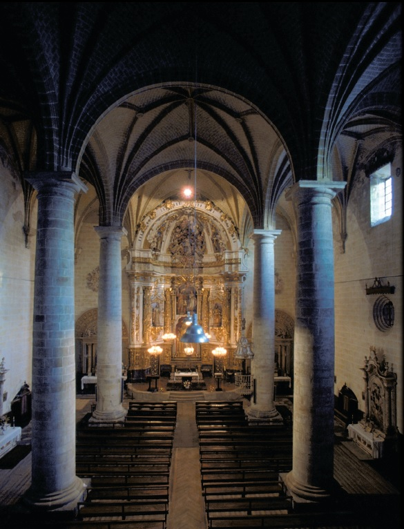 Aulestiko elizaren barnealdea